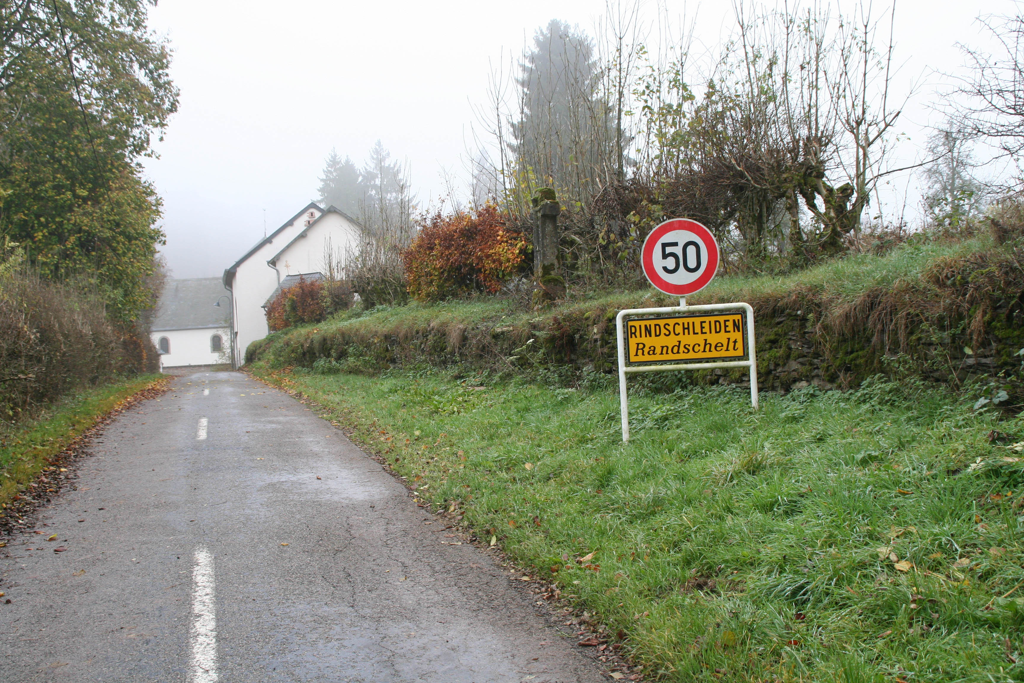 Uertschaftschëld Randschelt.